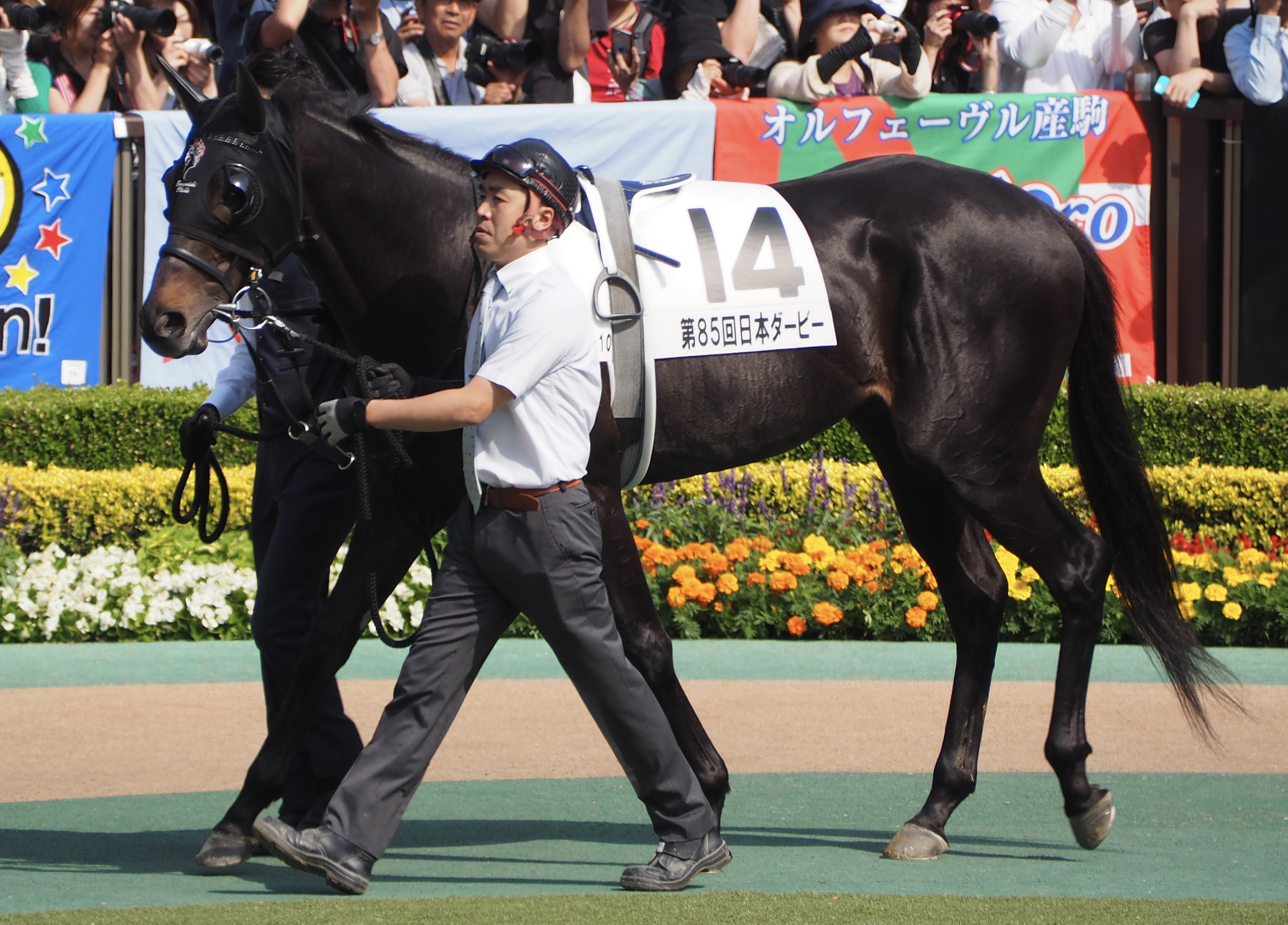 10R 東京優駿 日本ダービー